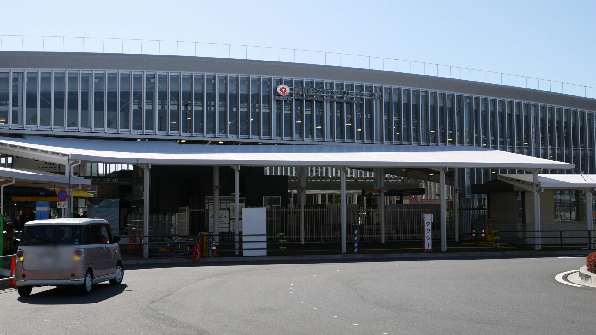 南町田グランベリーパーク駅